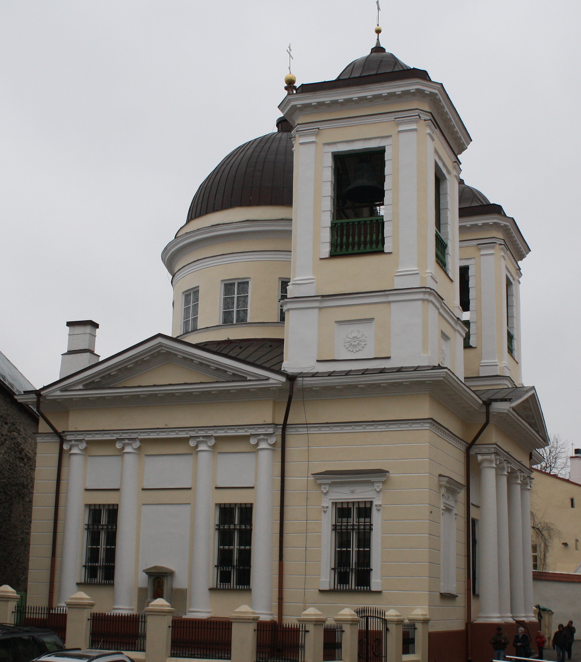 Tallinna Nikolai kirik Tallinnas Vene tänaval.